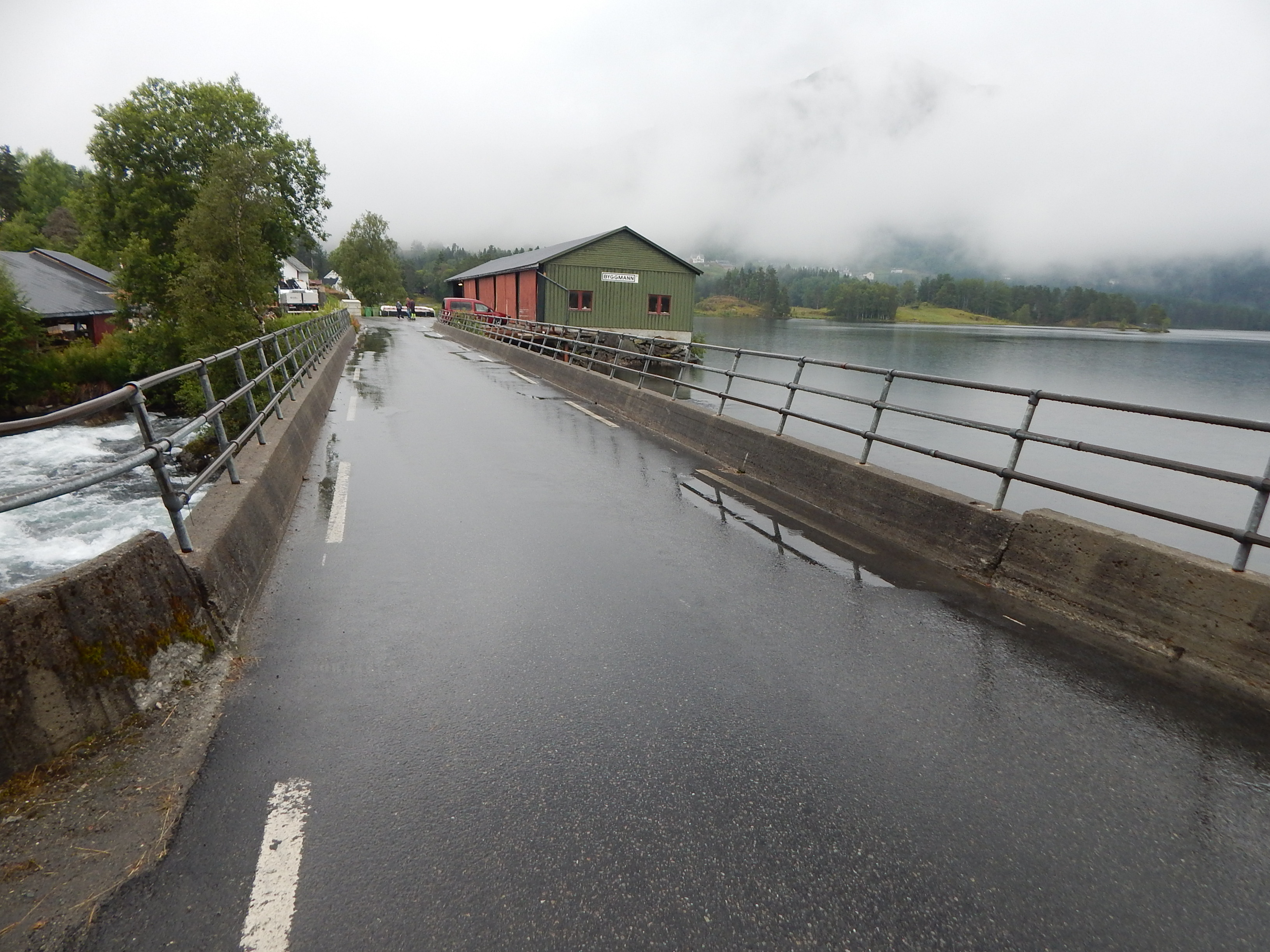 Fylkesvei 100 ved Skare sagbruk (t.v.). Til høyre ses Lotevatnet.